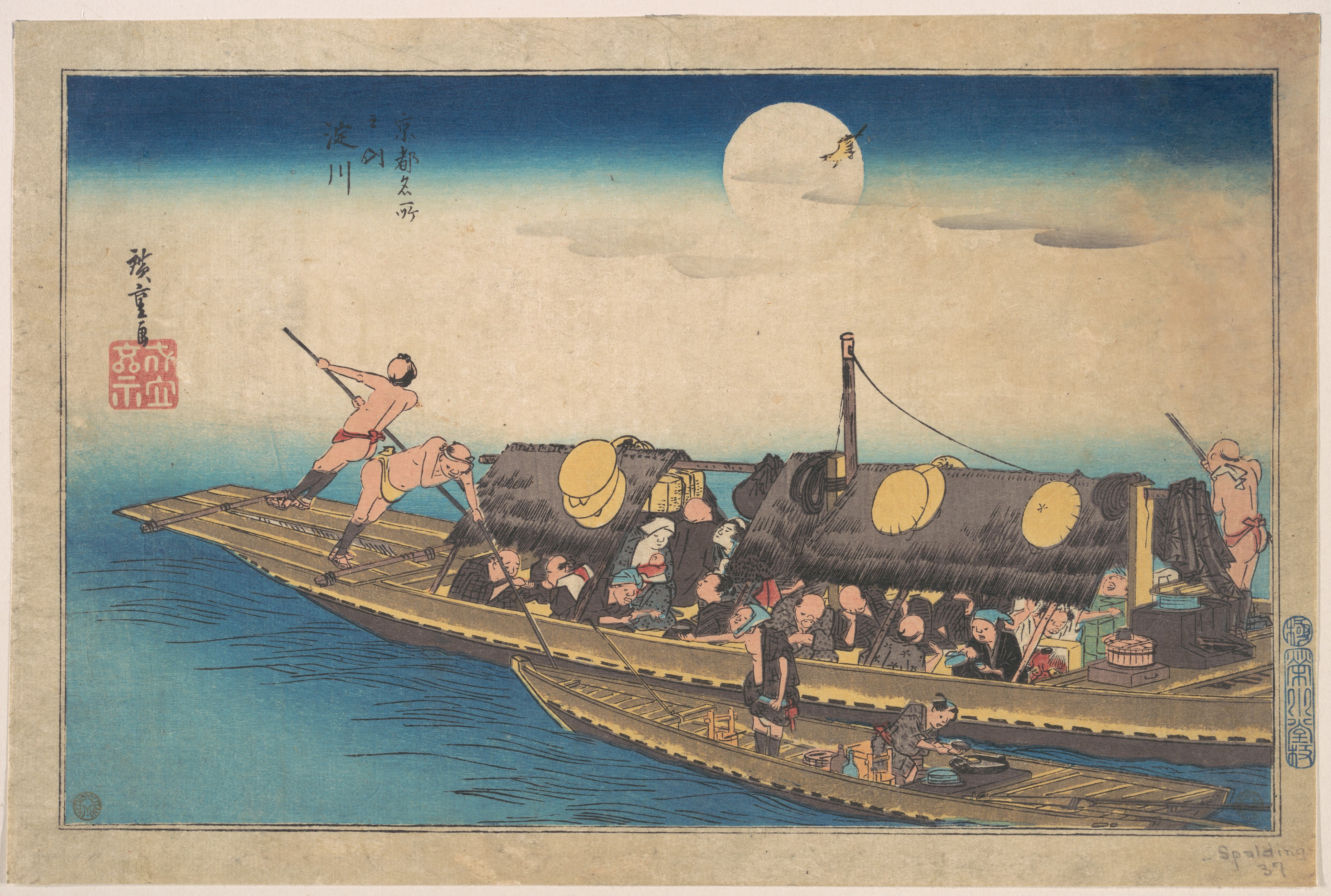 Japan; Print; Prints